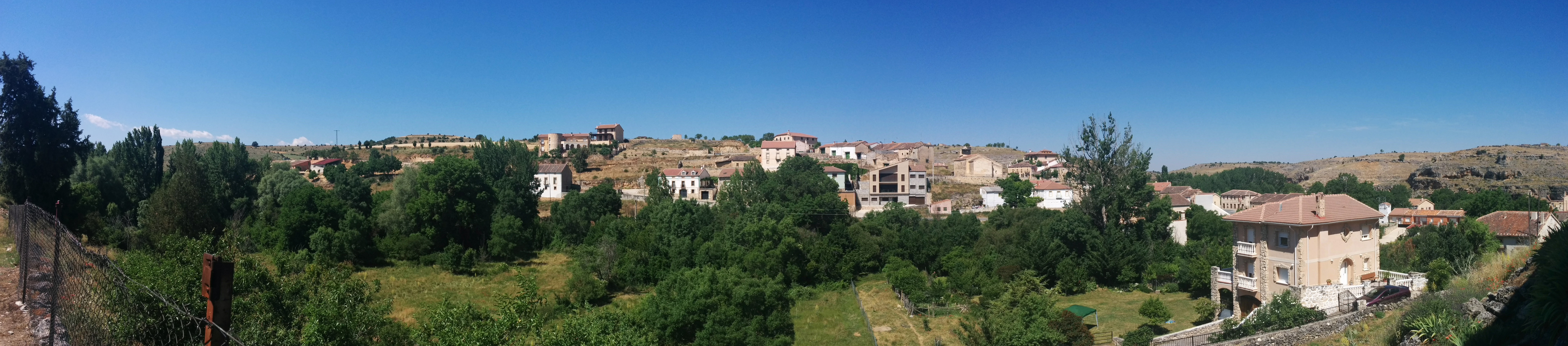 Vista panorámica de Castroserna de Abajo (Segovia, España).